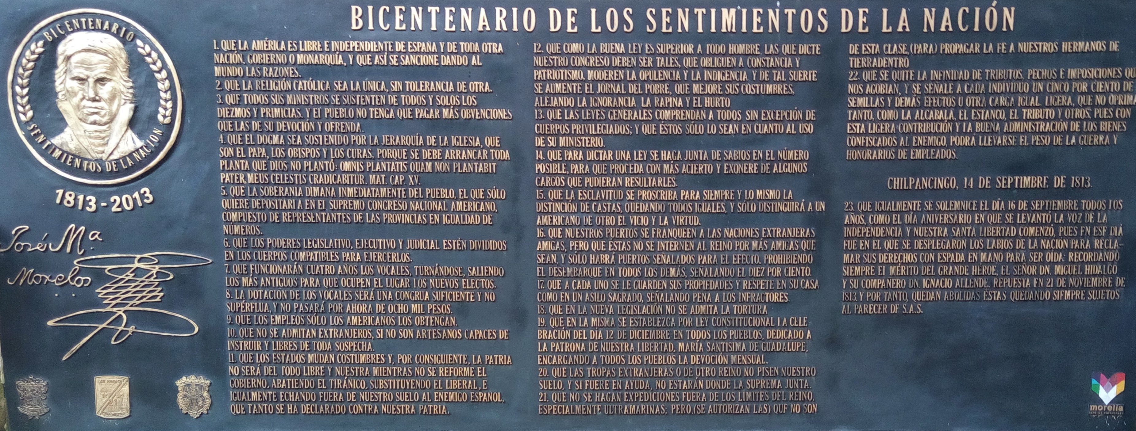 Placa con los "Sentimientos de la Nación" de José María Morelos y Pavón